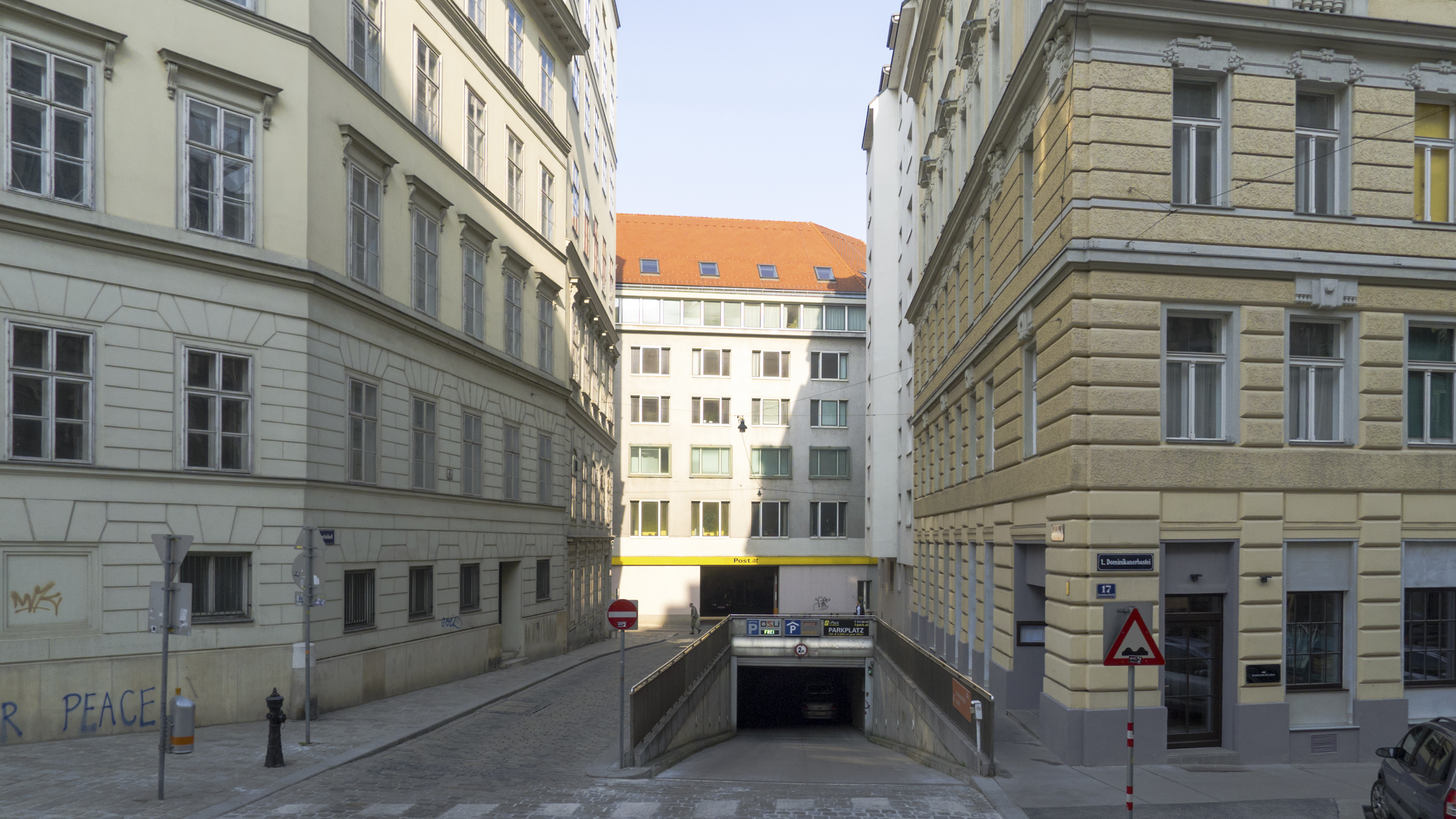 Auwinkel in Wien 1 bei der Dominikanerbastei Richtung Westen